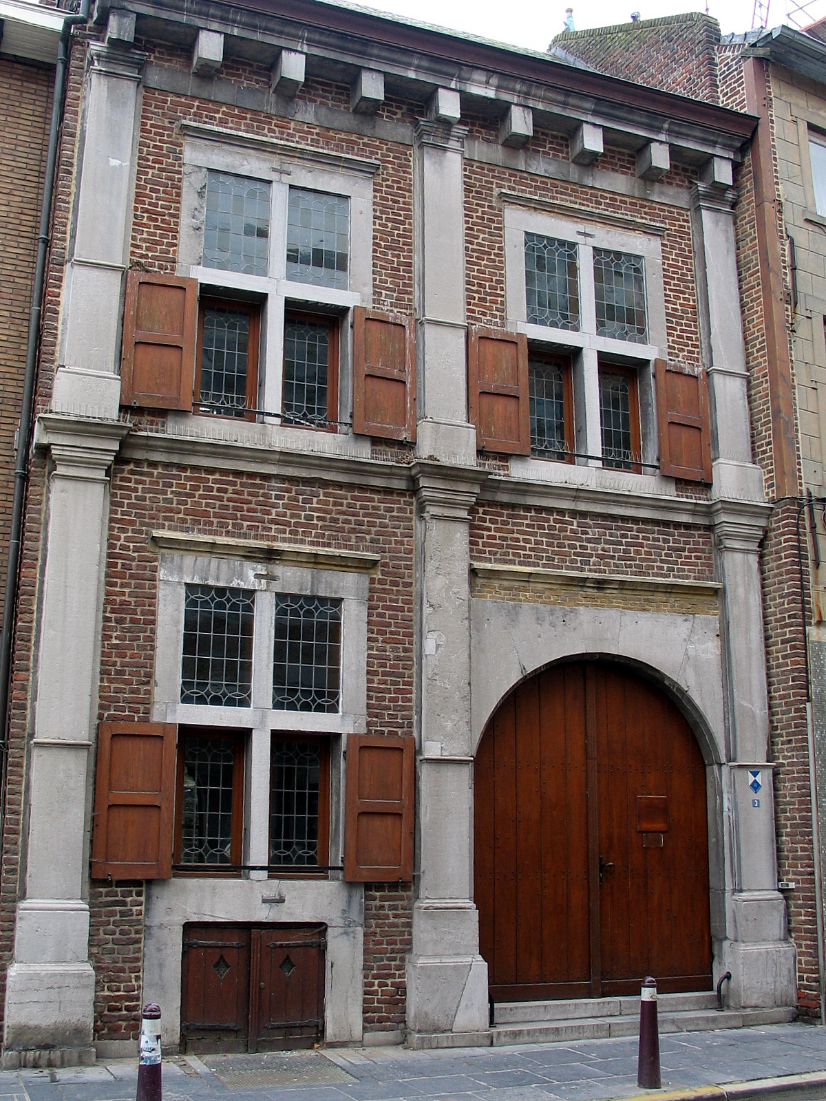 Pilastergevel in Maaseik, België.